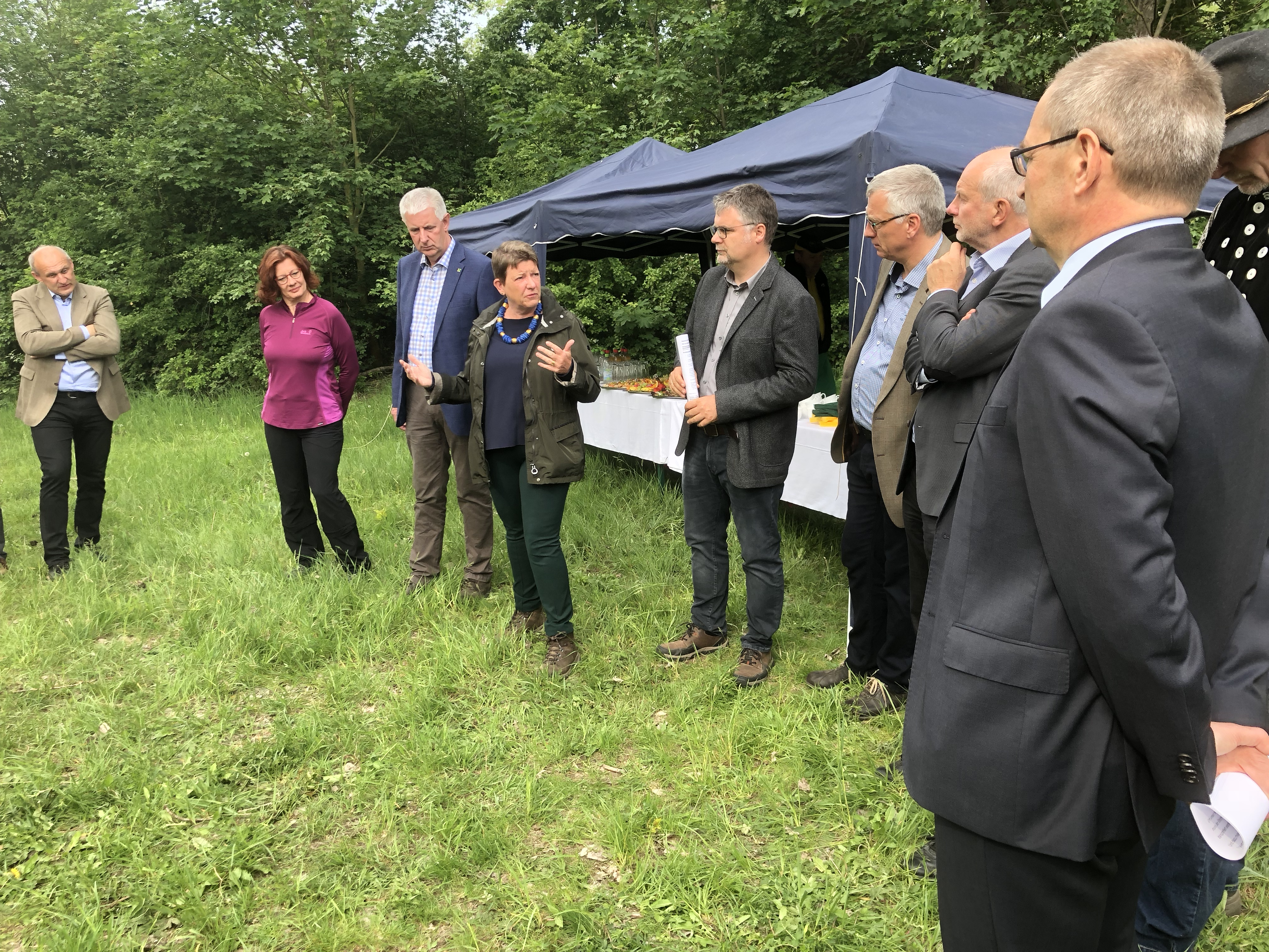 Start Umweltprojekt in den Sohlener Bergen mit Umweltministerin Claudia Dalbert